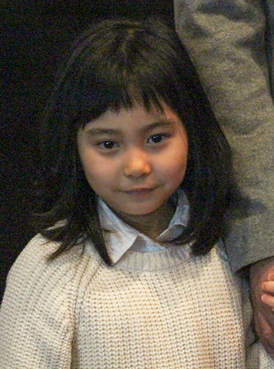 130202 7번방의 선물 무대인사 갈소원